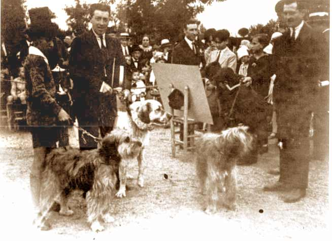 Dos gossos d'atura, el tac i el Iris, presentats a la expo de Barcelona de 1929